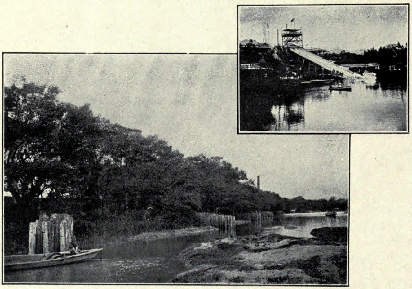 左門殿川河岸と香露園遊園地